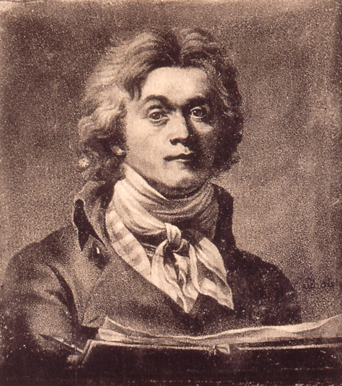 Porträt Christophe Guérin (1758-1831) in einer Ablichtung von 1890, technische Ausführung des Originals unbekannt